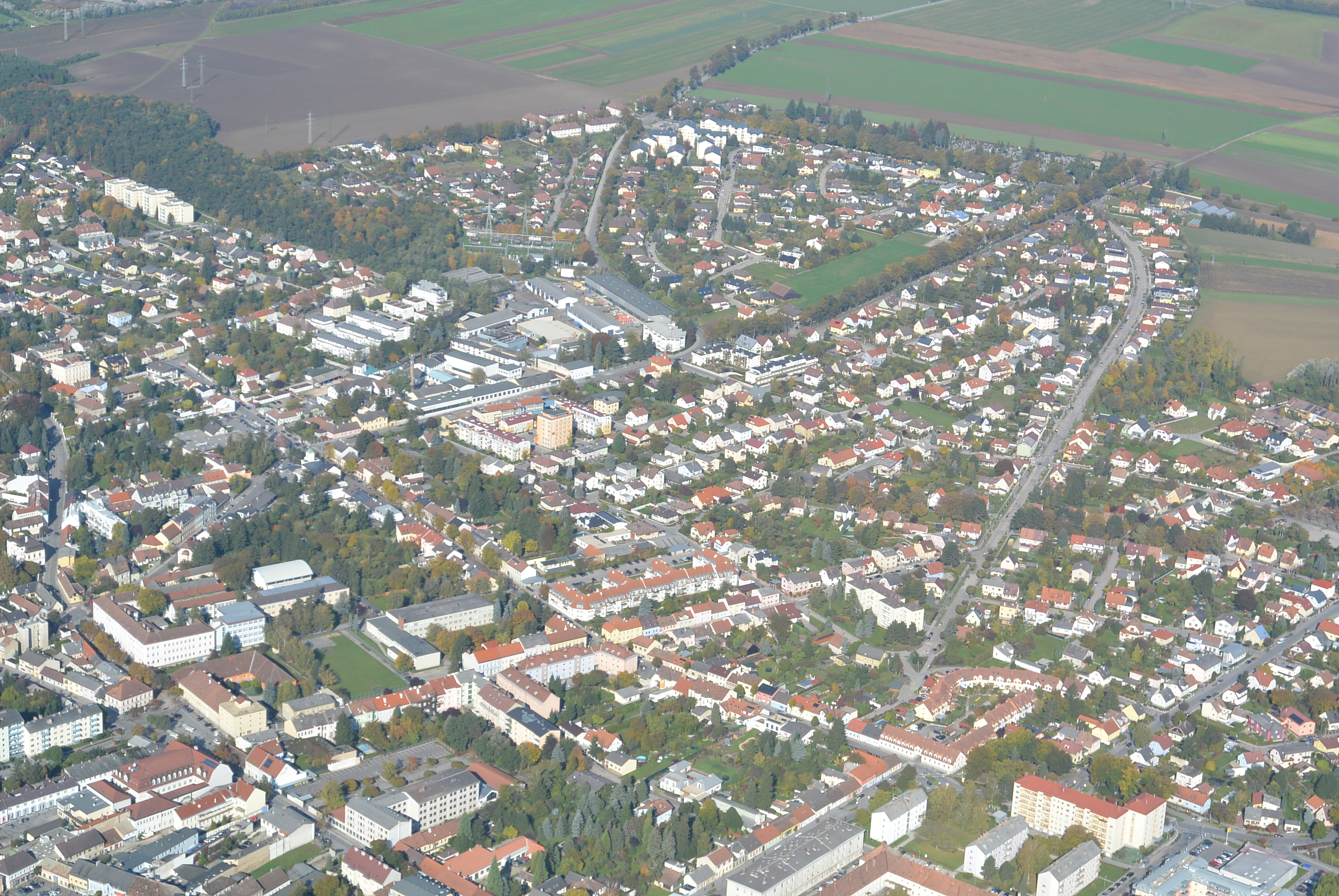 Luftfoto Stockerau 2013